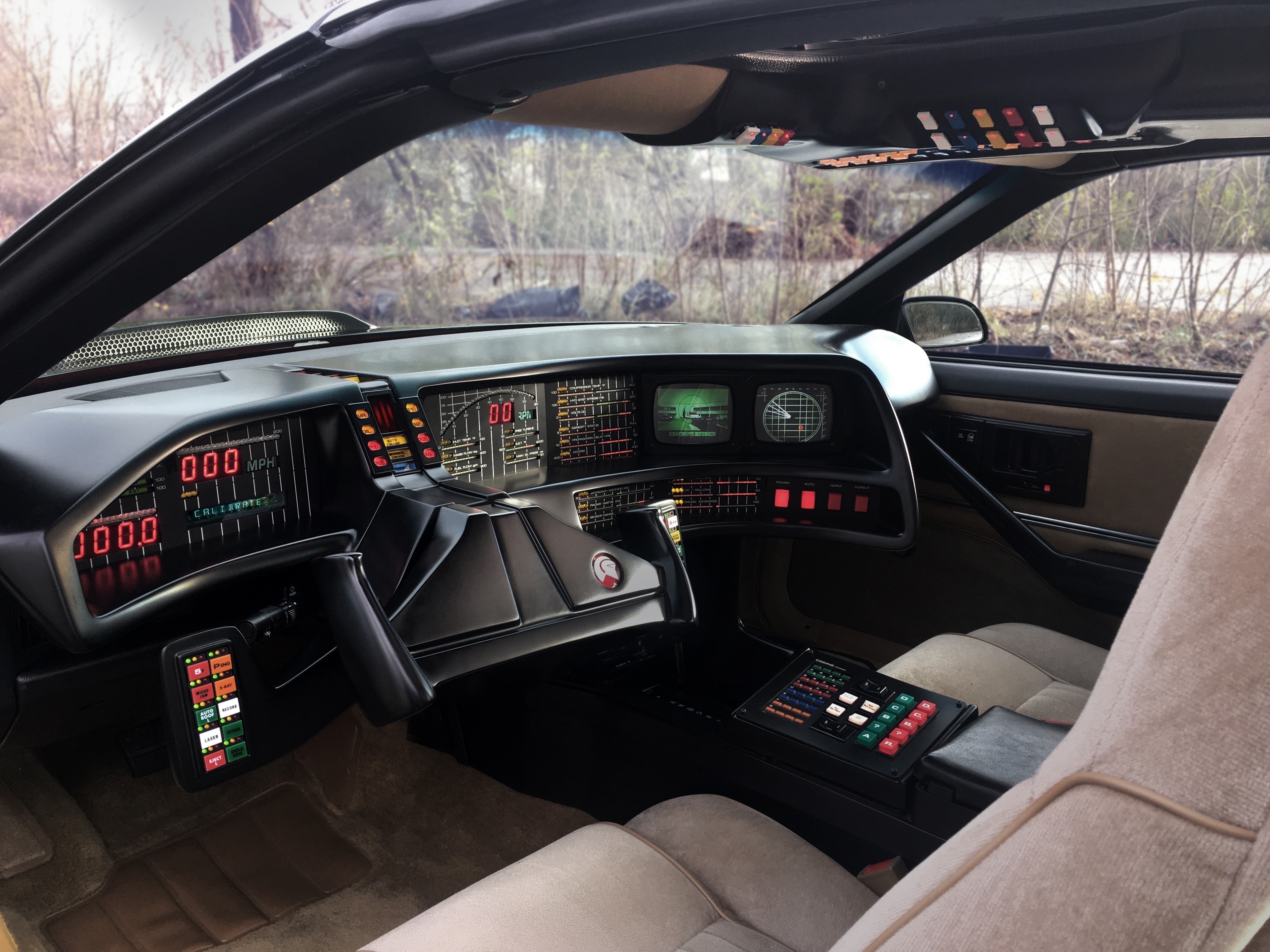 Detailgetreuer Nachbau des Staffel 1/2 Cockpits im Replica von "The Knight Mission". Das Fahrzeug begleitete David Hasselhoff 2018 auf allen Konzerten seiner "30 Years Looking for Freedom" Tour in Deutschland und Österreich.